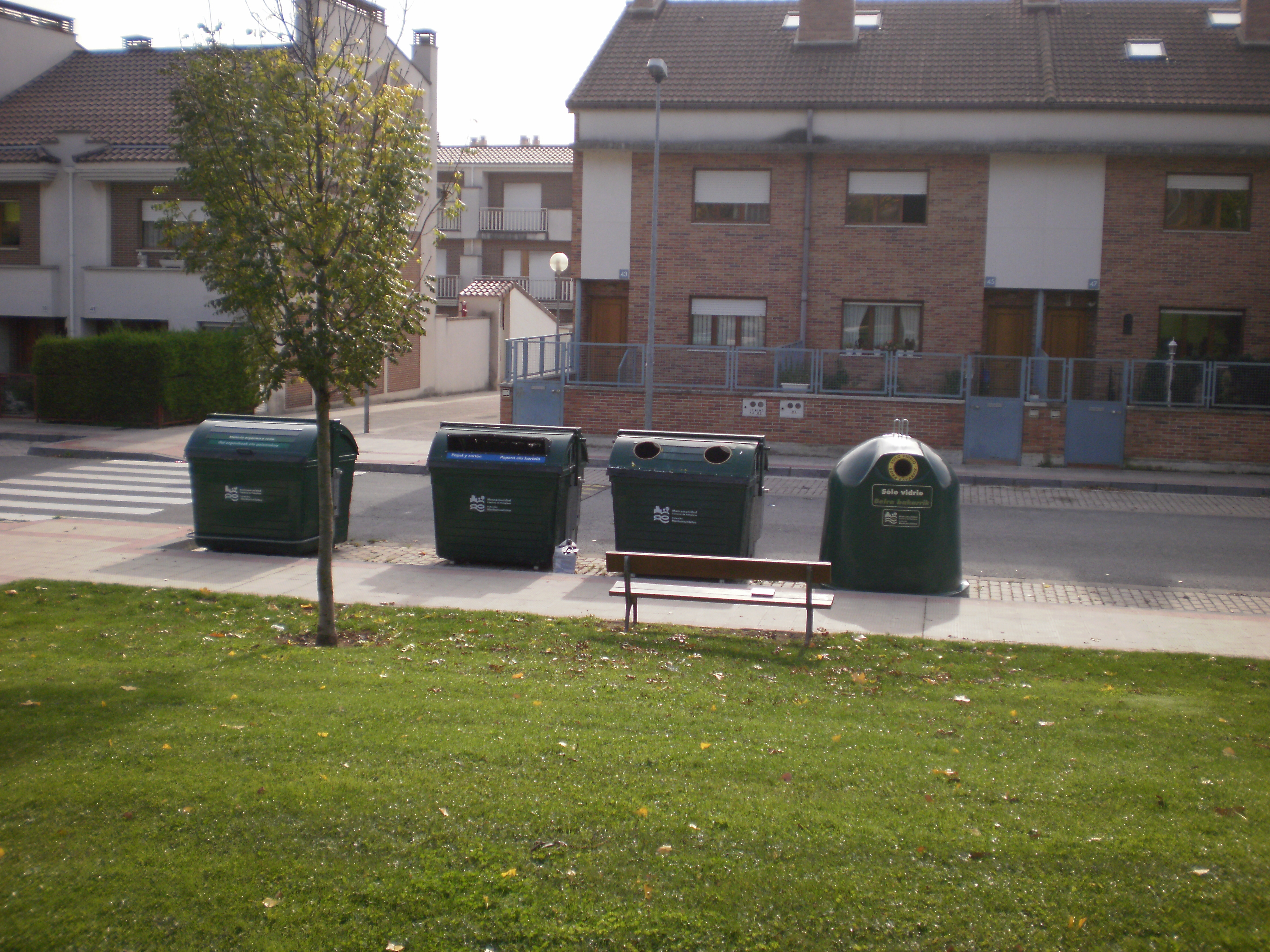 Contenedores para la recojida selectiva de Plasticos y envases, Papel-Cartón, Residuos Organicos y Vidreo de Ansoáin (Navarra-España)